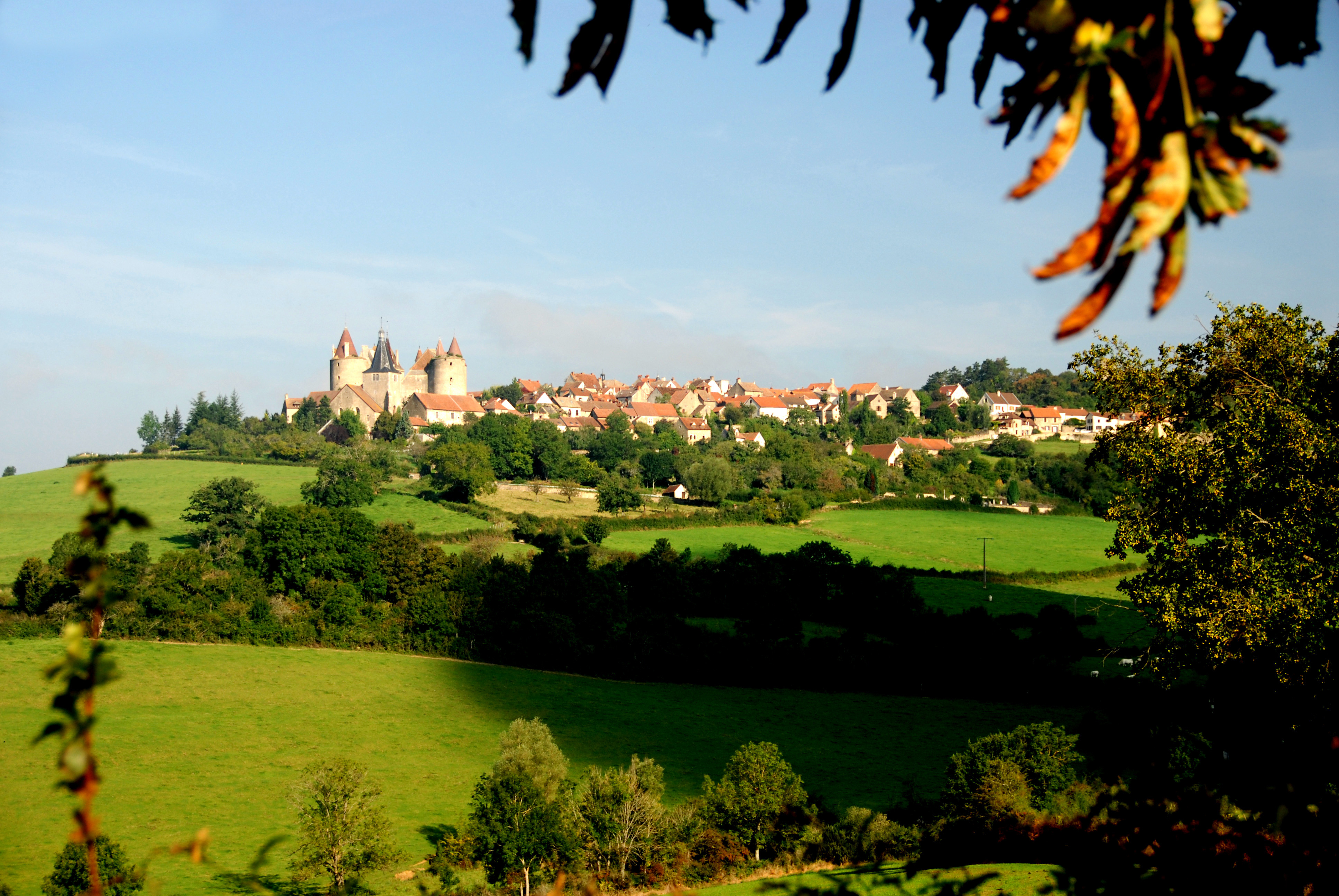 Châteauneuf, Panorama von S